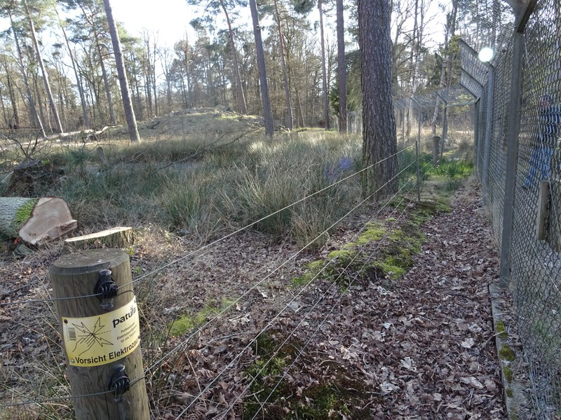 Zaunanlage um das Wolfsgehege im Wildpark Alte Fasanerie Klein Auheim